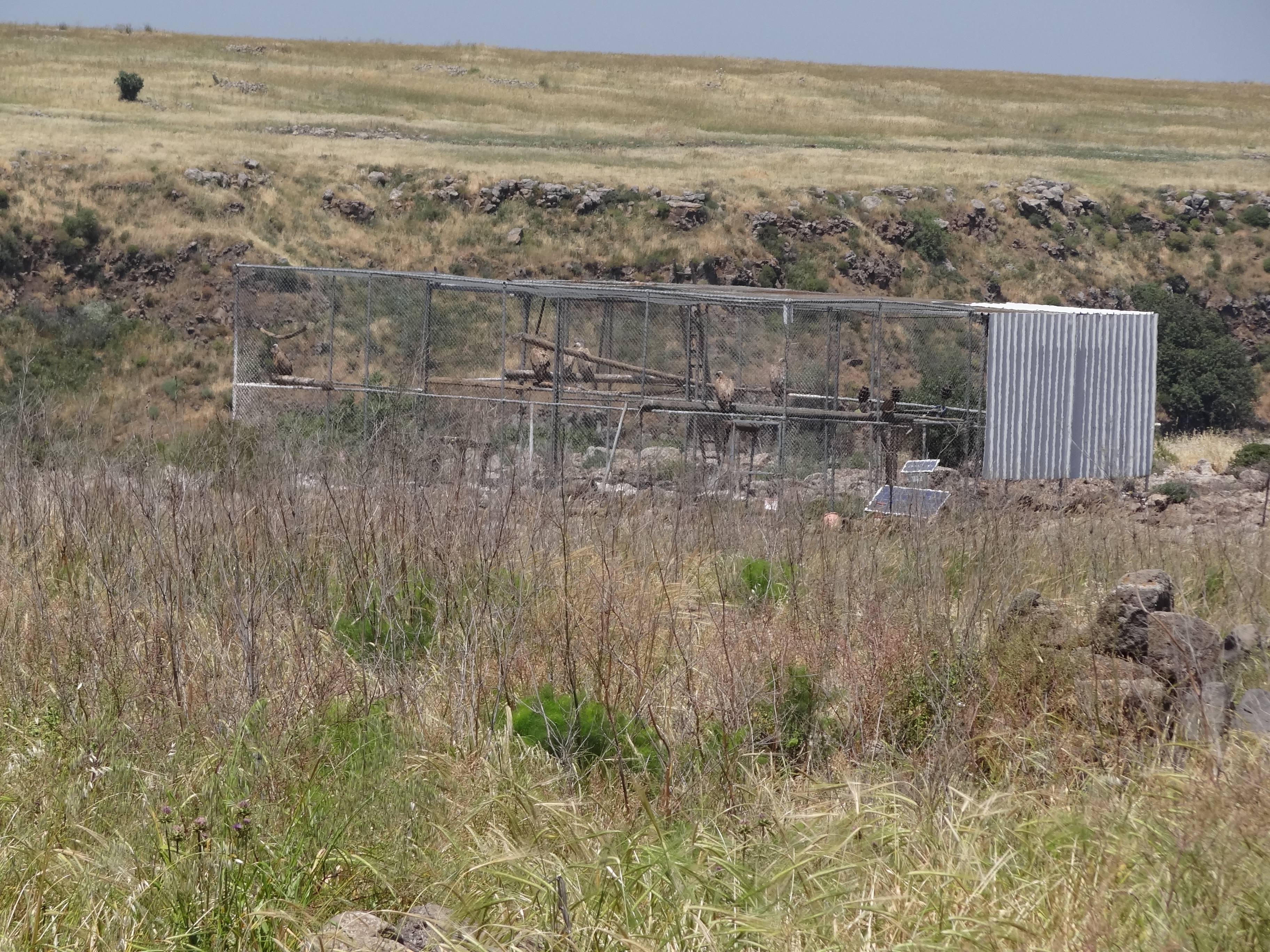 Gamla Nature reserv in Golan Heights גמלא היא שמורת טבע ואתר ארכאולוגי במרכז רמת הגולן, כ-20 קילומטרים דרומית לקצרין. כלוב באקלום של הנשרים על שפת המצוק של נחל גמלא